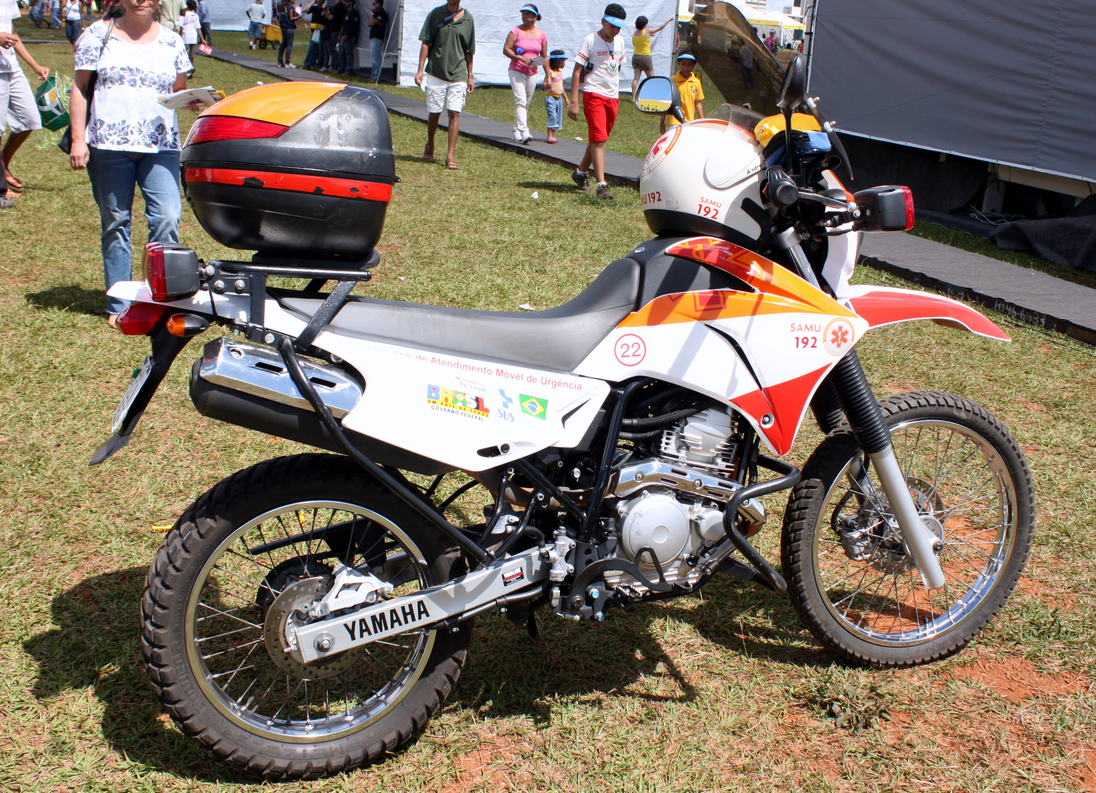 Serviço de Atendimento Móvel de Urgência Lei do Direito Autoral nº 9.610, de 19 de Fevereiro de 1998: proibe a reprodução ou divulgação com fins comerciais ou não, em qualquer meio de comunicação, inclusive na Internet, sem prévia consulta e aprovação do autor. Reproduction prohibited. © All rights reserved. Image protected by the Brazilian Copyright Law No. 9610 19/02/1998 Contato